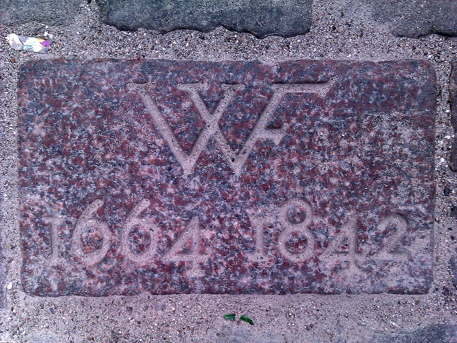 Mindesten over Corfitz Ulfeldt på Gråbrødre Torv som markerer hvor skamstøtten over ham stod, København